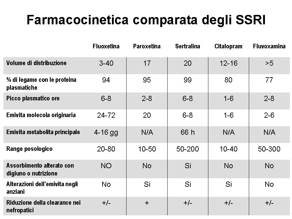 Parametri farmacocinetici comparati dei vari SSRI